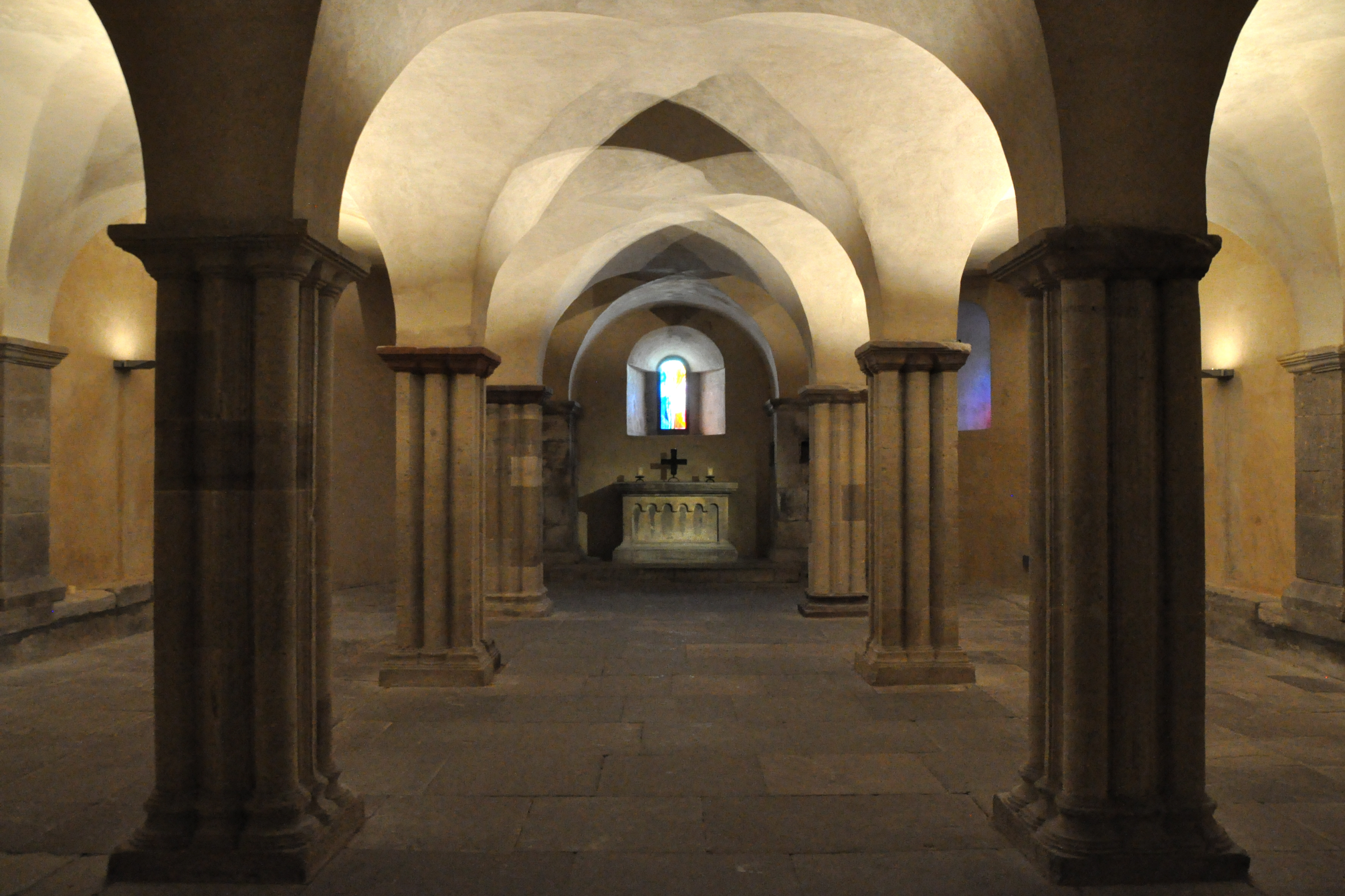 Krypta nach Osten.